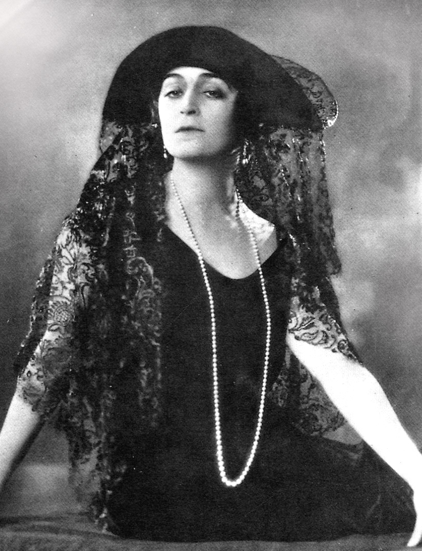 L'attrice Diana Karenne - immagine del 1917